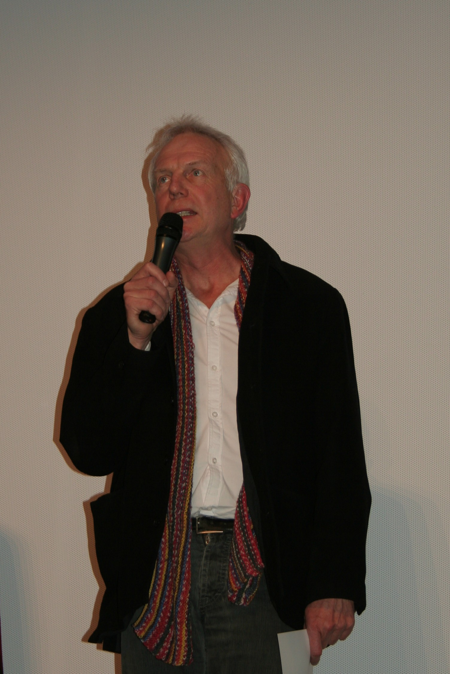 Jean-Paul Mignot, festival international des cinémas d'Asie 2010, Vesoul, France